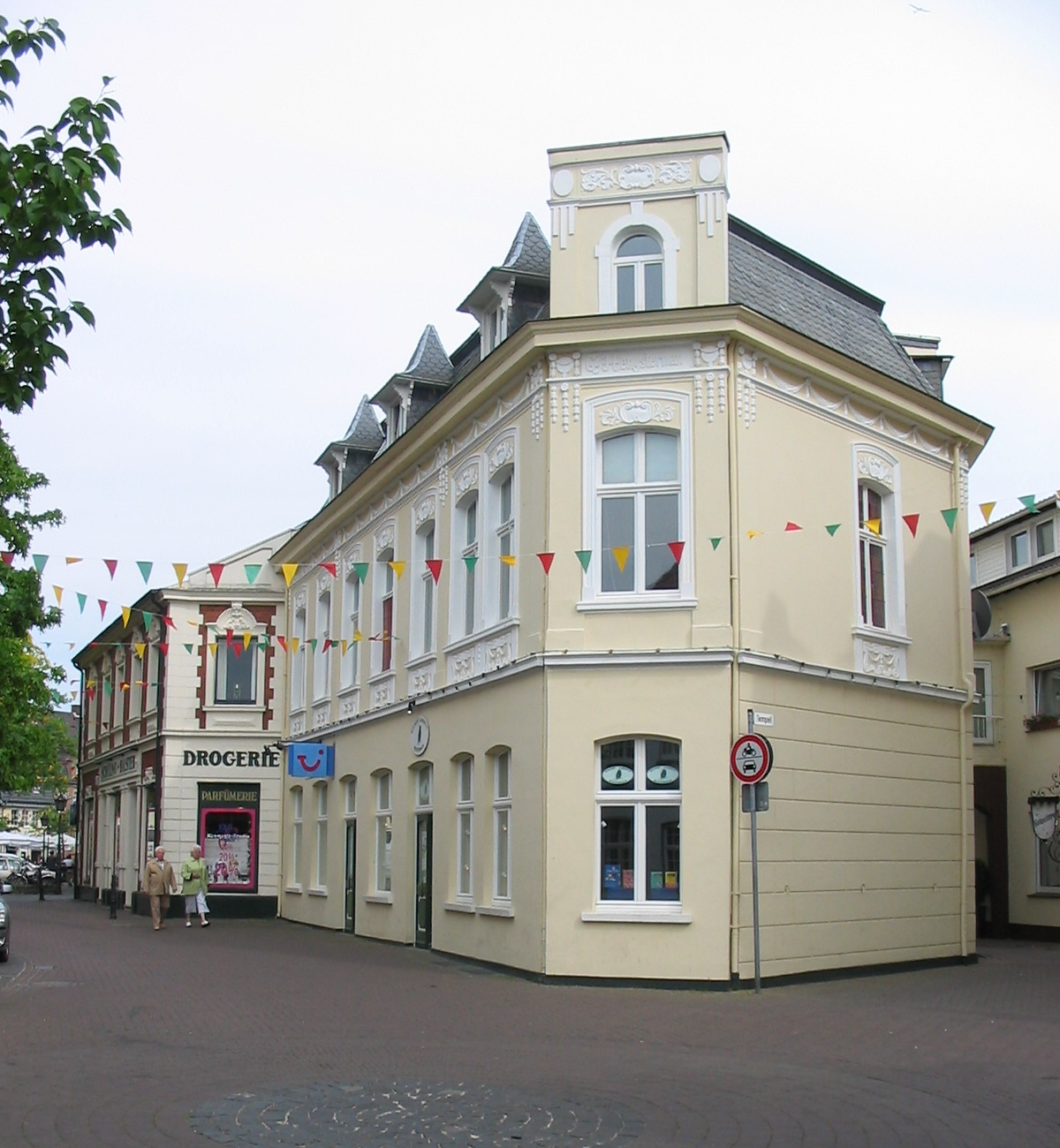 A „Bürgerhaus“ in Rhede, Westfalen